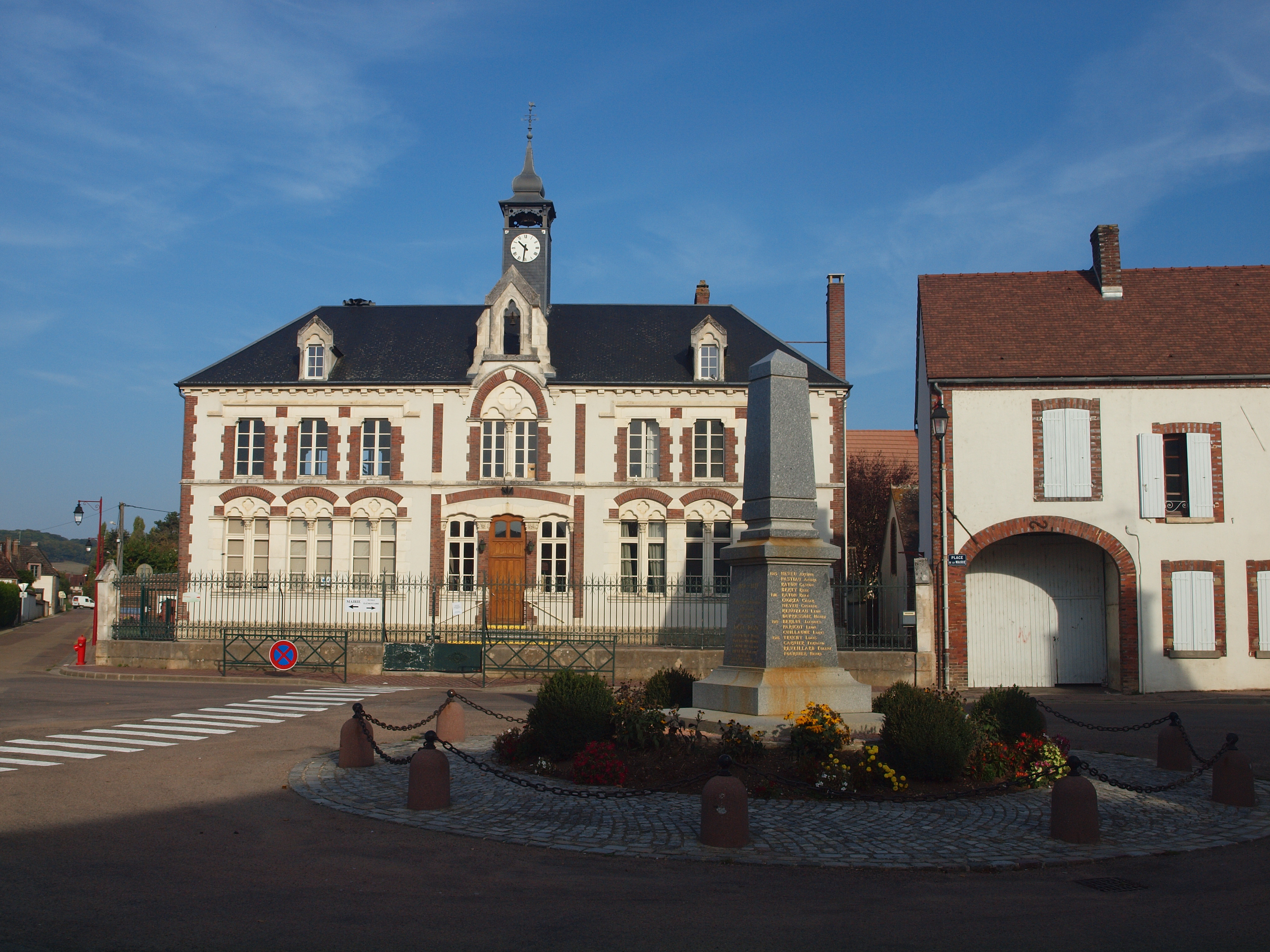 Mairie & monument aux morts de Chailley (Yonne, France)